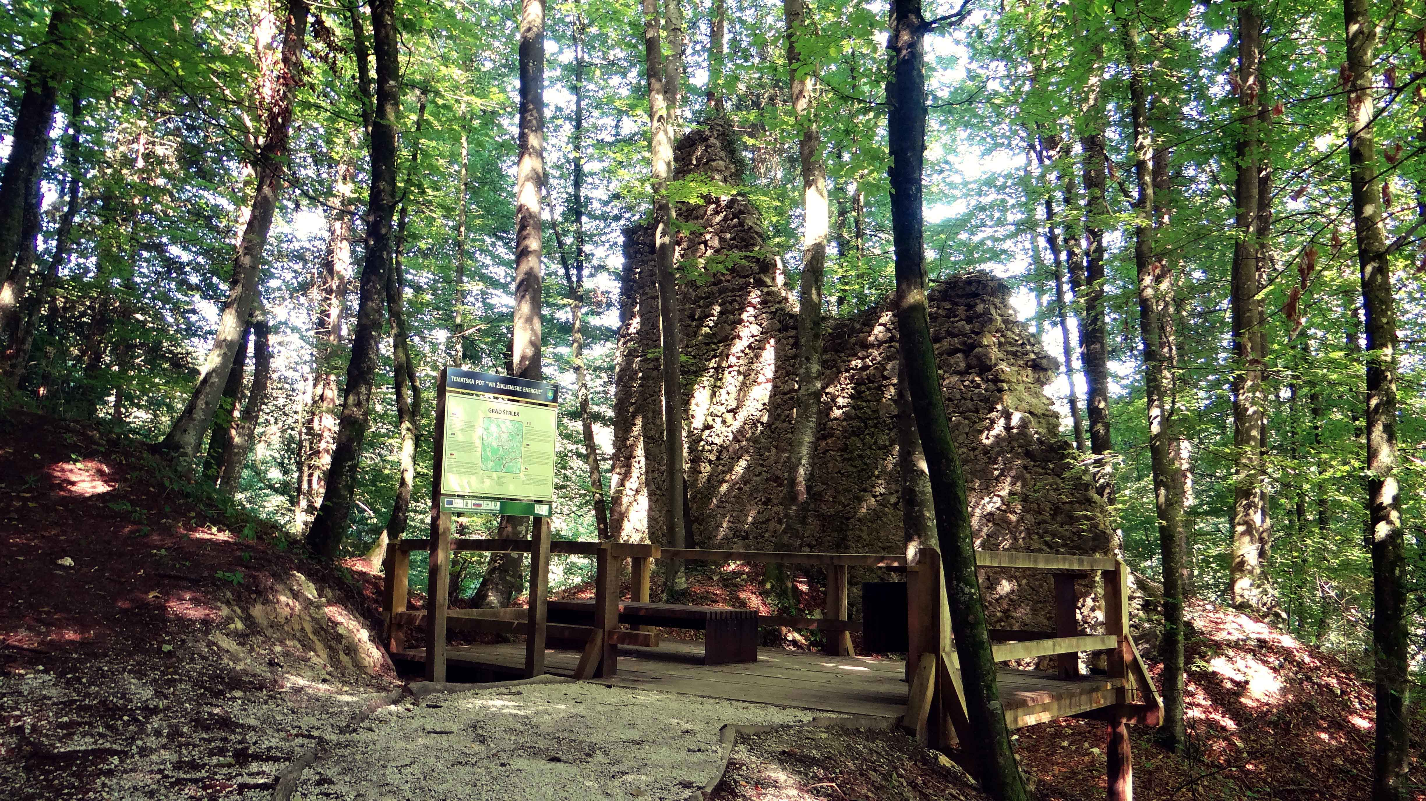 Ruševine gradu Štrlek 2013